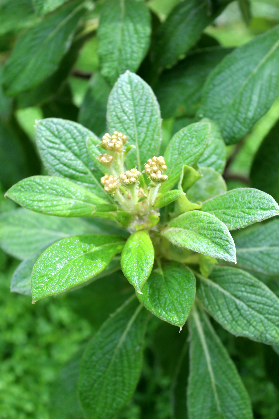 Fleurs